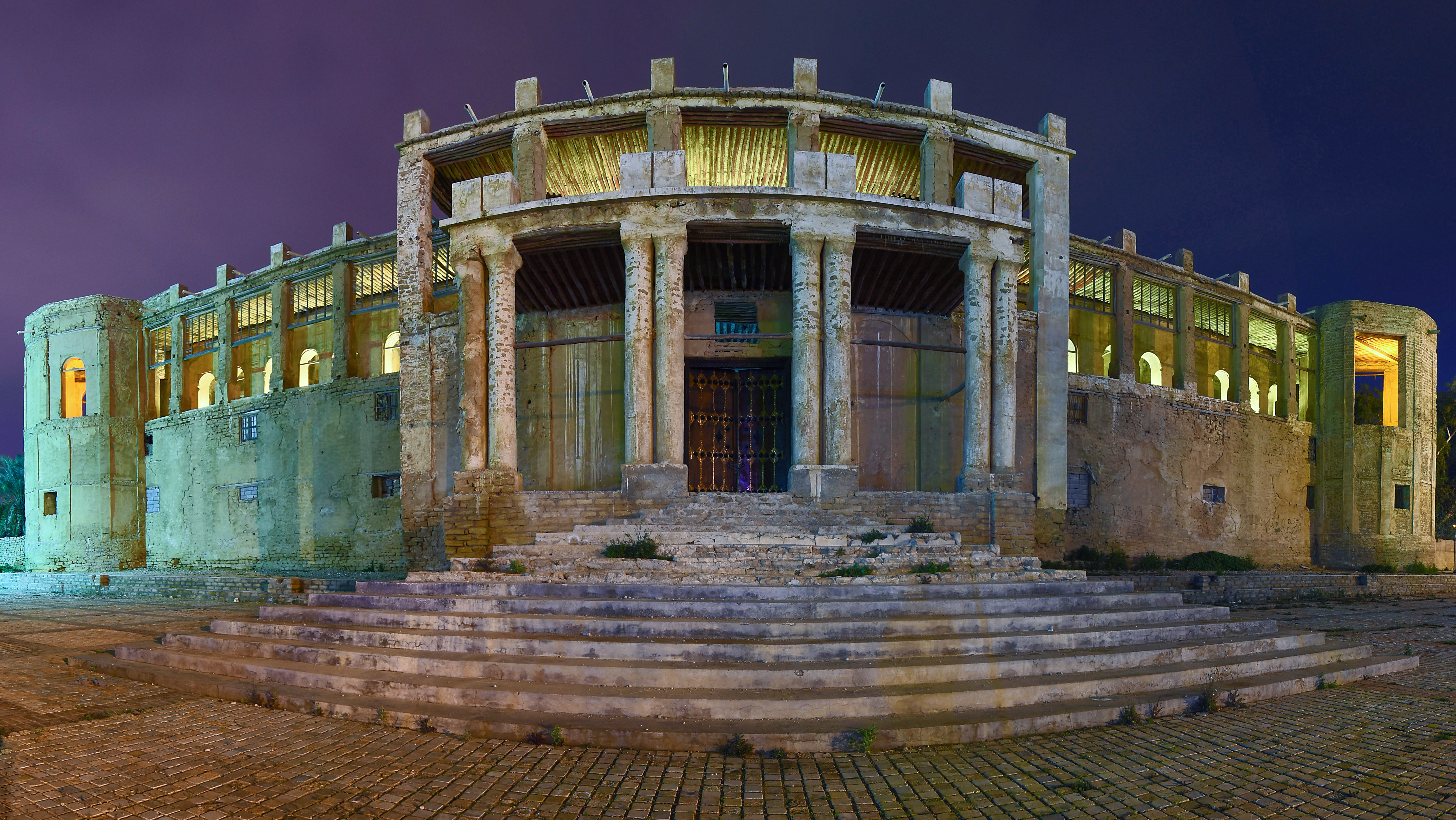 عمارت ملک بوشهر